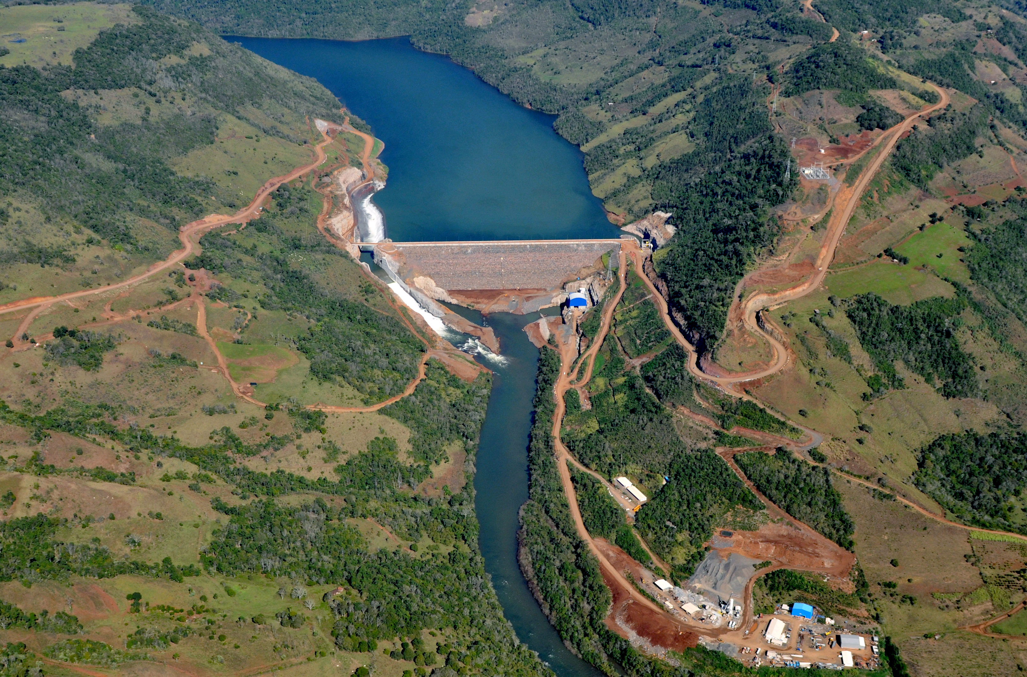 Monjolinho kraftverk i Rio Grande do Sul, Brasil.